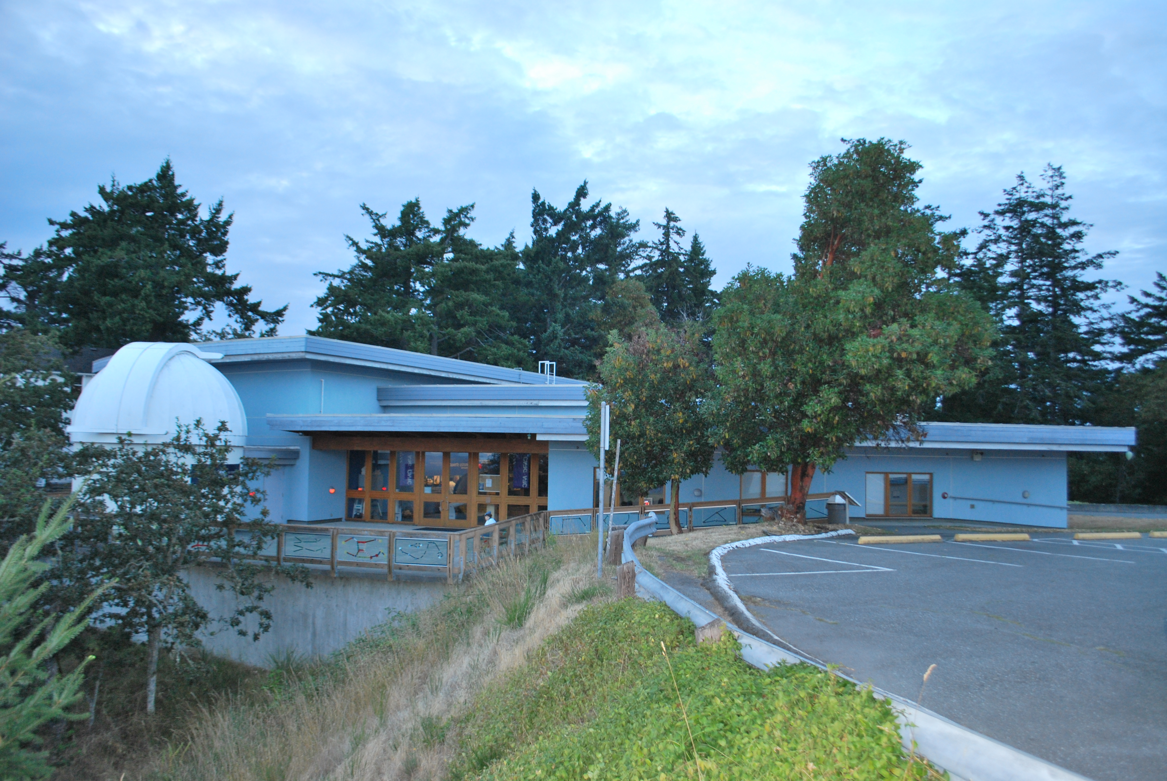 Centre d'interprétation scientifique Center of the Universe sur le site de l'Observatoire fédéral d'astrophysique à Victoria (Colombie-Britannique) .